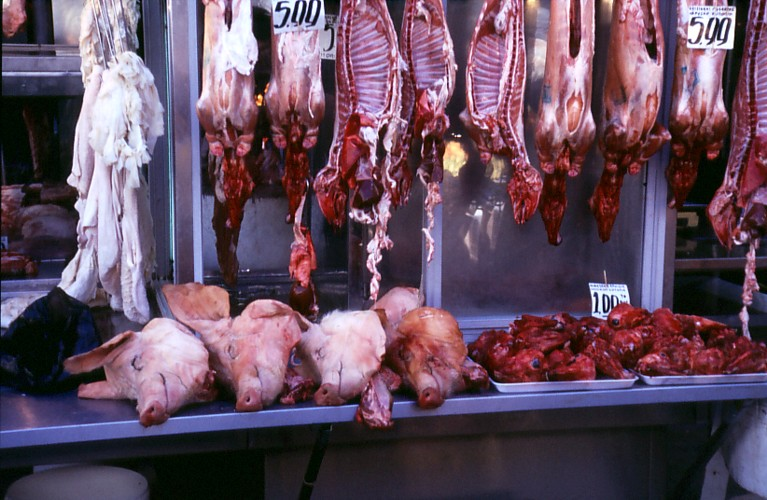 Schweineköpfe, Schweinekopf, Lämmer, Lammköpfe, Lammkopf, Fleisch, Markt Thessaloniki